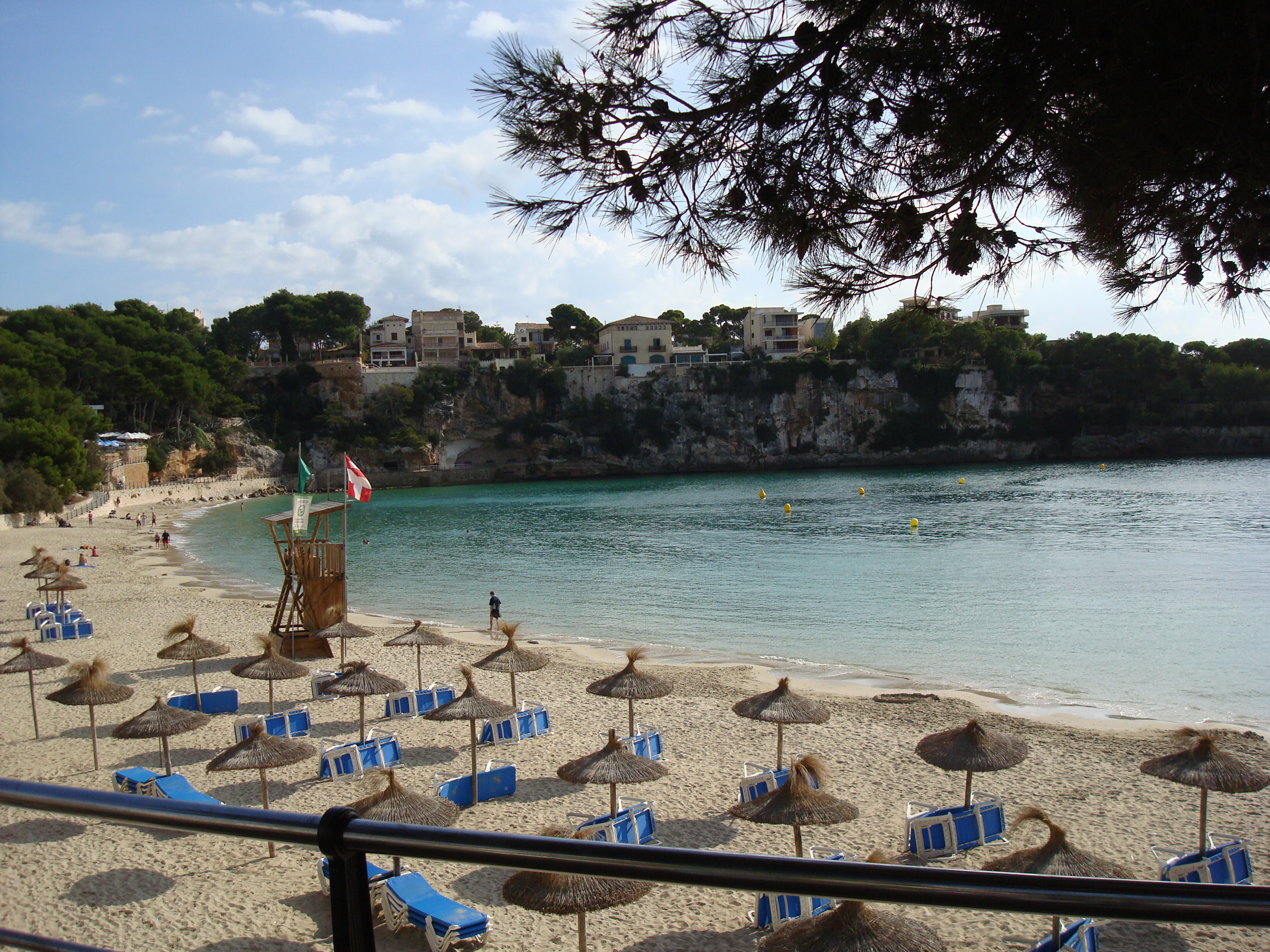 La plage